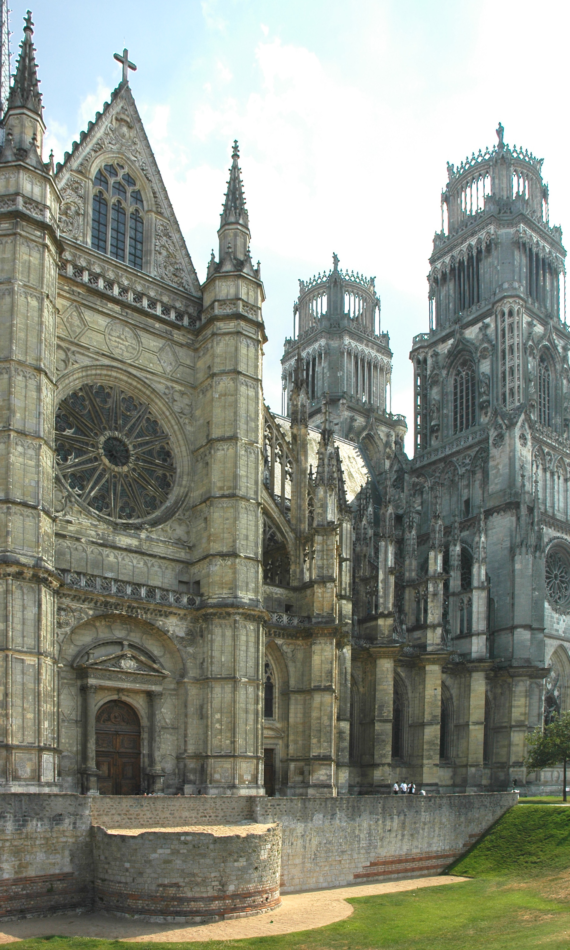 France Loiret Orléans Cathédrale, vestiges des remparts Photographie prise par GIRAUD Patrick